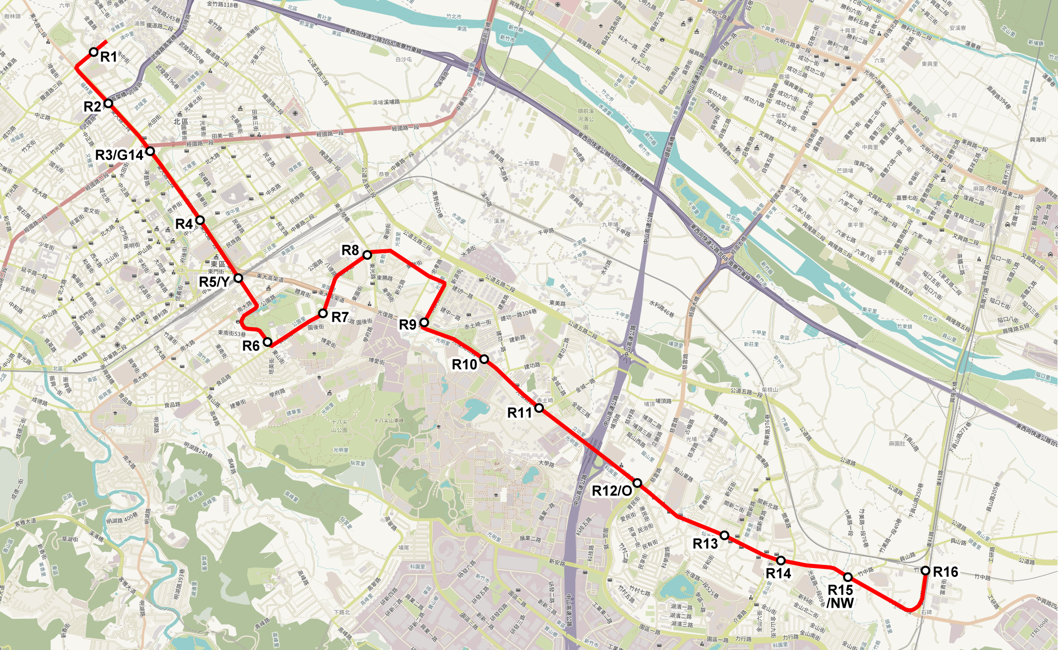 2007年竹竹苗輕軌運輸系統紅線路線圖